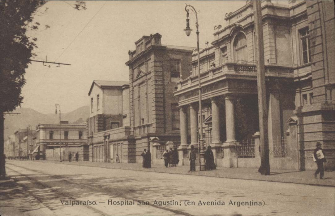 Hospital San Agustín en la Avenida Argentina